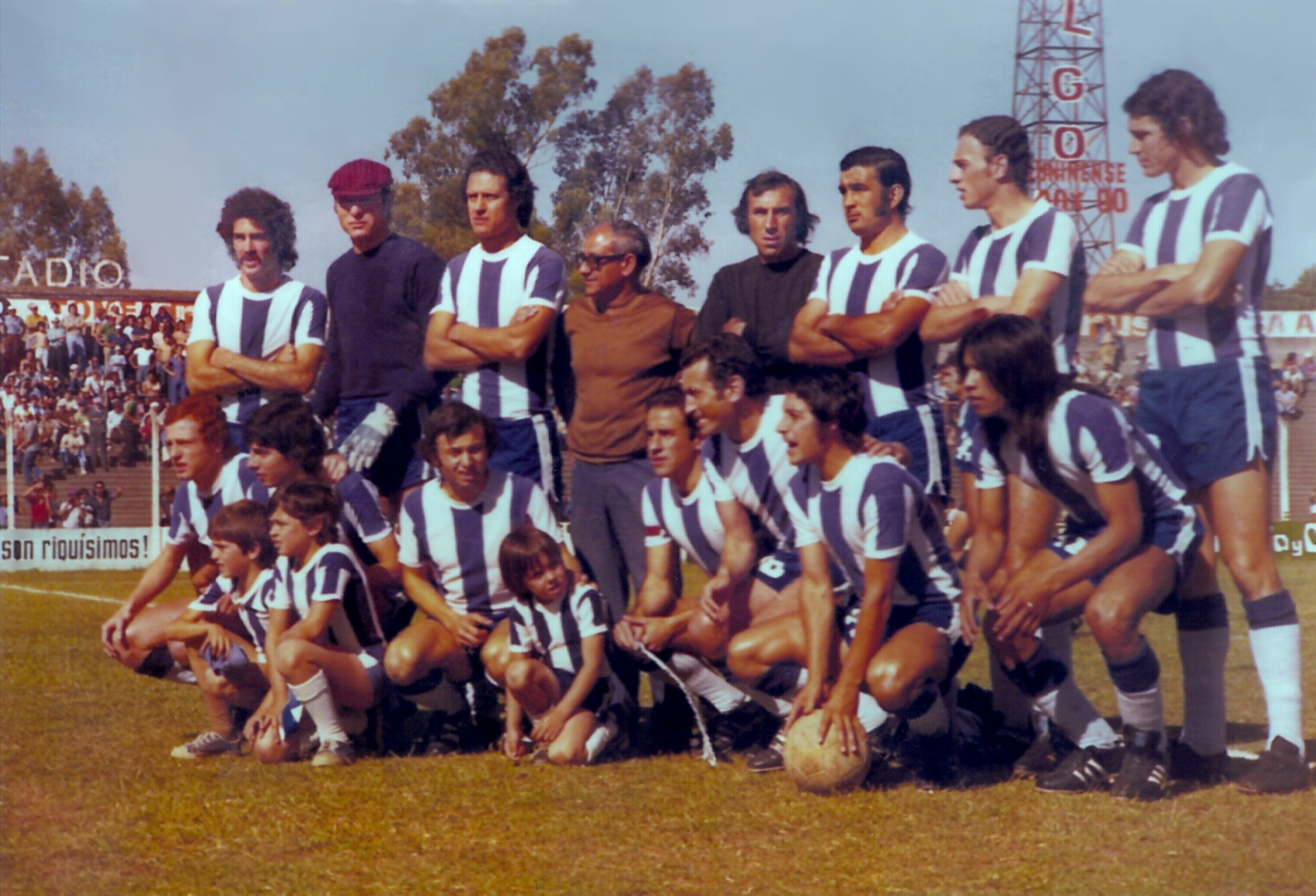 Equipo del Club Jorge Newbery en el Estadio Eva Perón del Club Atlético Sarmiento, durante un partido del campeonato de Primera A en 1975. Junín, Argentina.